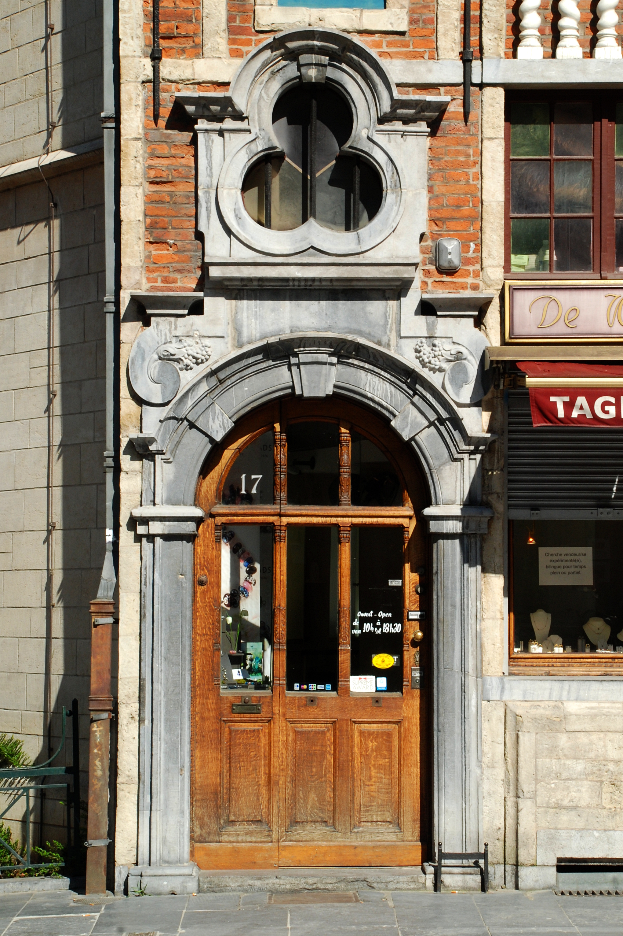 Belgique - Bruxelles - Maison de Goude Huyve